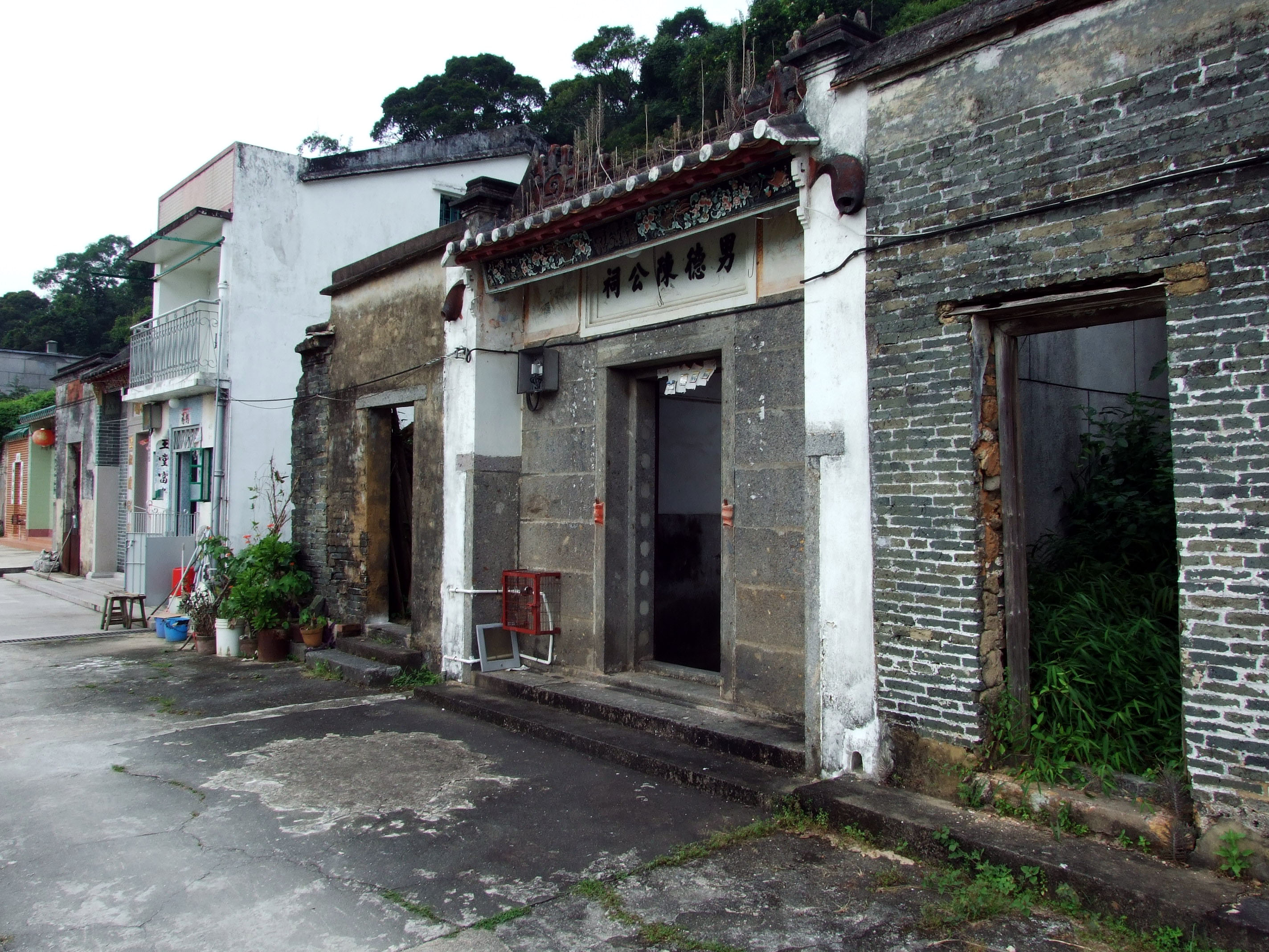 中文（香港）: 男德陳公祠